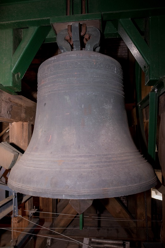 De Papklok in de toren van Nijkerk.